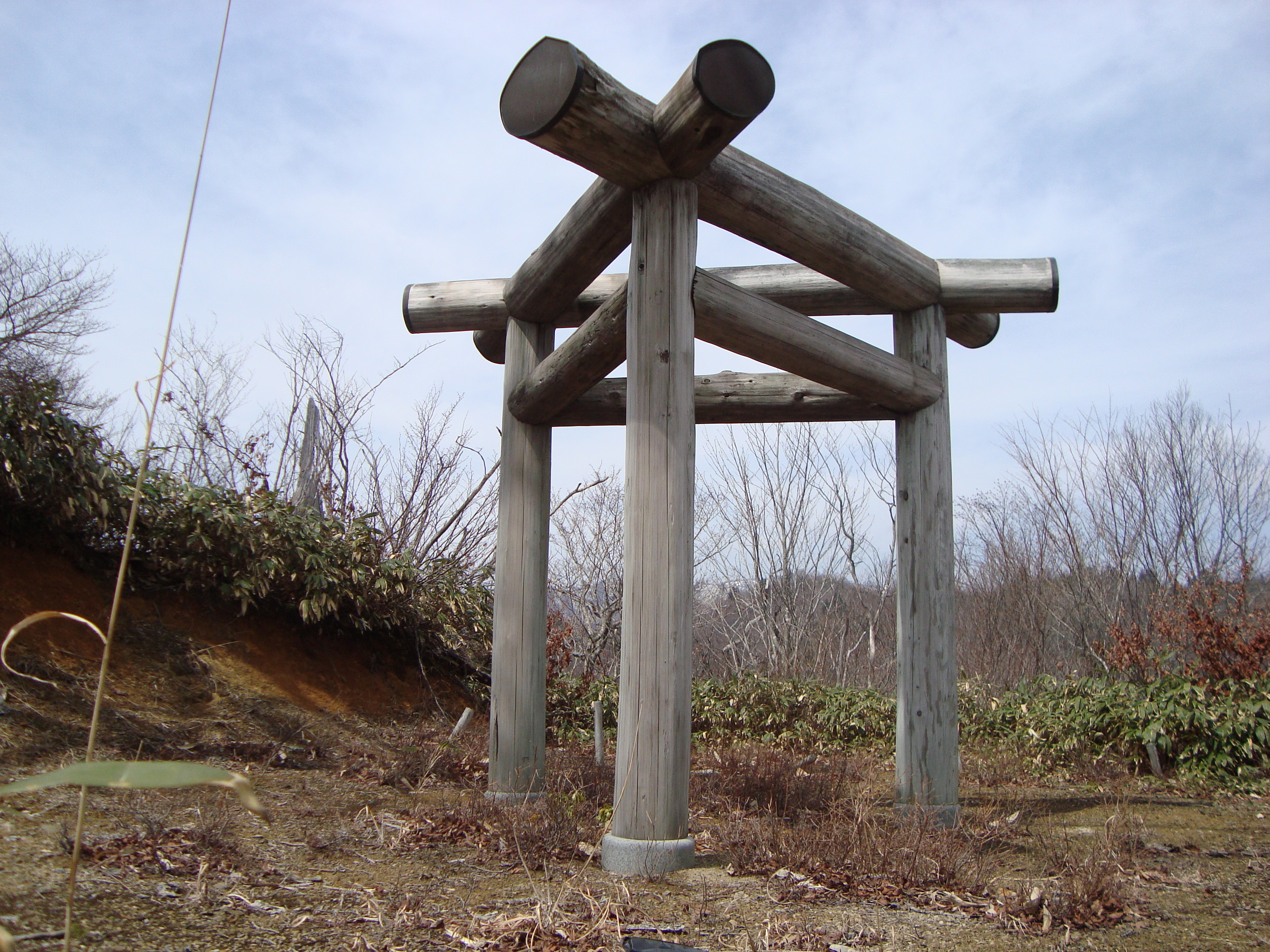 "Mihasira torii in yamatomati,岐阜県大和町の三柱鳥居"